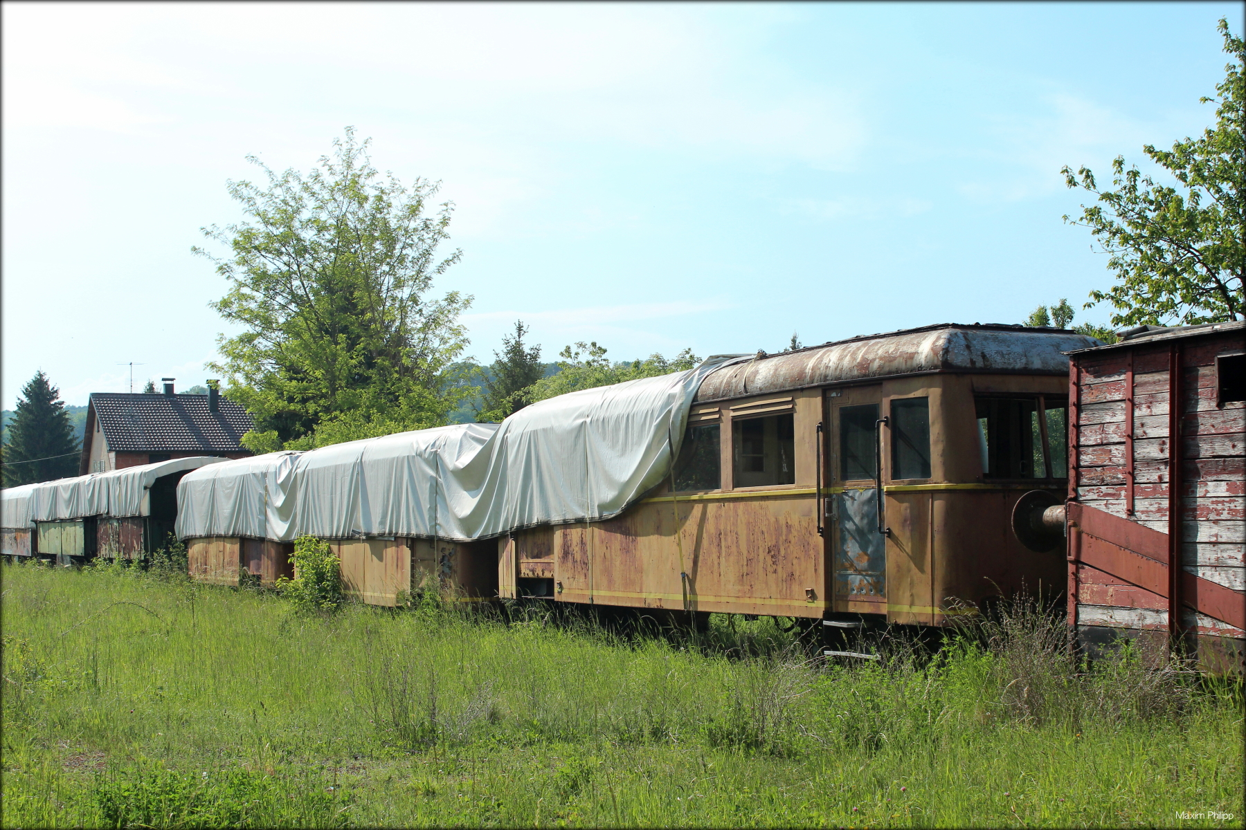 Ehemalige RSE-Garnitur (T2, TA4, TA5) bei der Jagsttalbahn (2012)